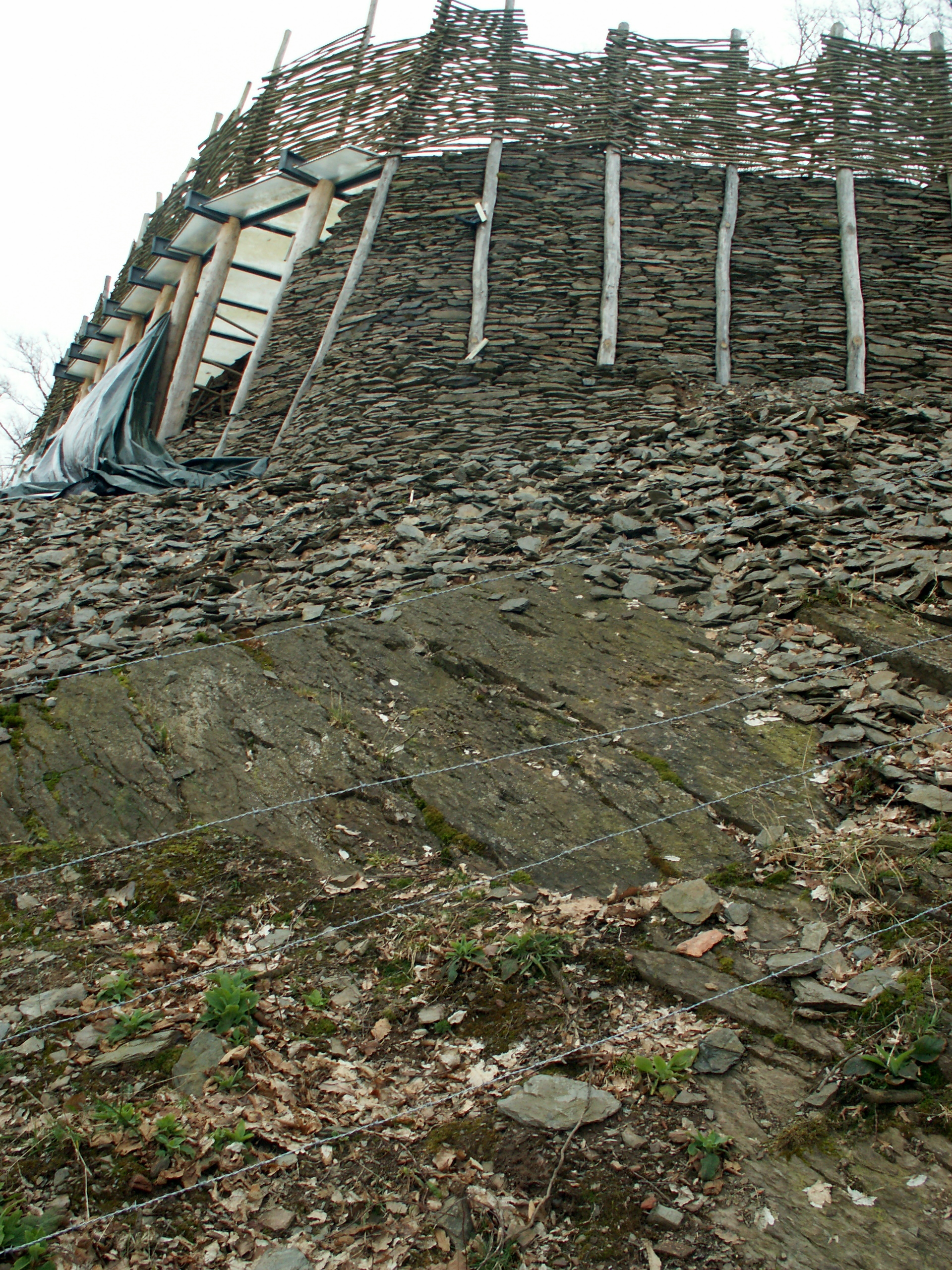 Le Cheslé de Bérisménil (Belgique) : camp foritifié celtique, reconstitution porte